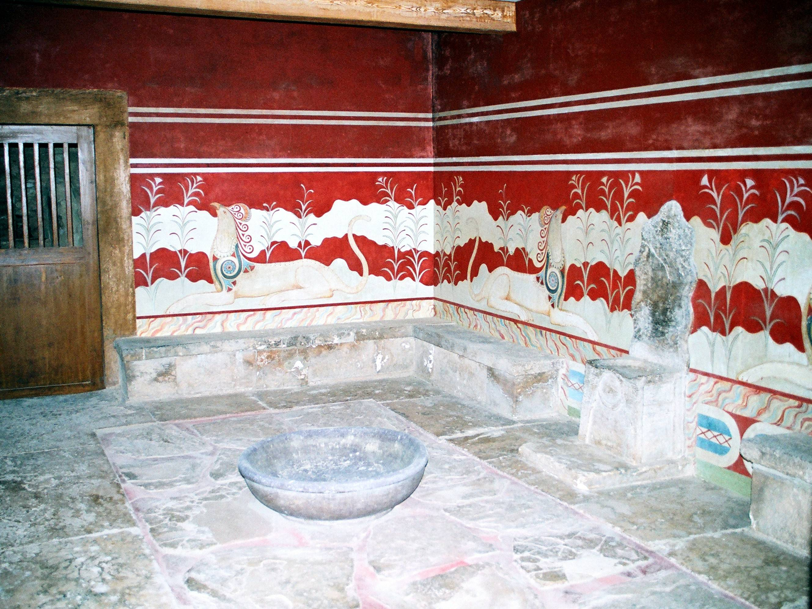 Am 13. April 1900 bei Ausgrabungen entdeckter „Thronsaal“ von Knossos südlich von Iraklio, Kreta, Griechenland